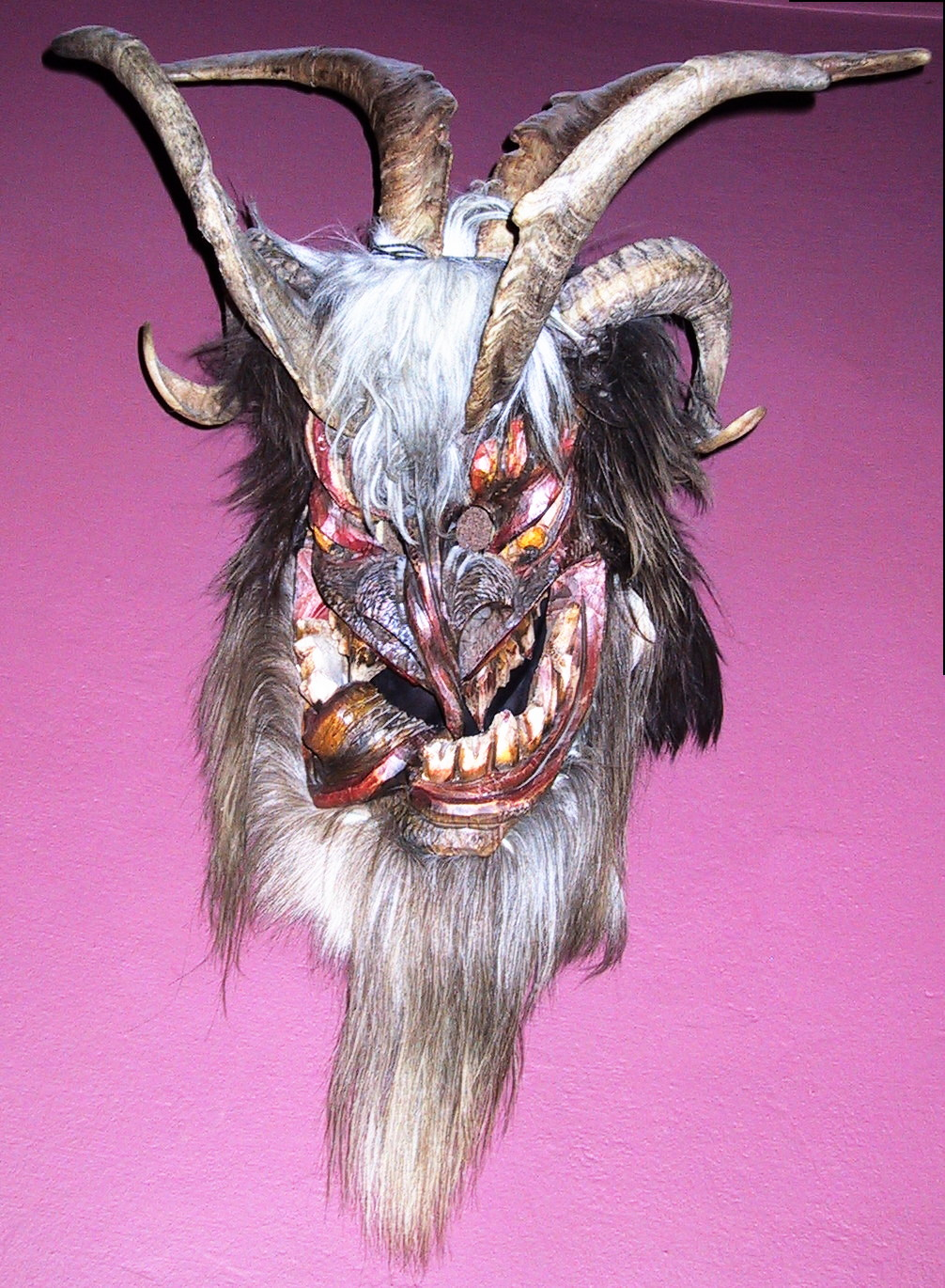 Perchtenmaske, in "Haus der Natur", Salzburg Austria